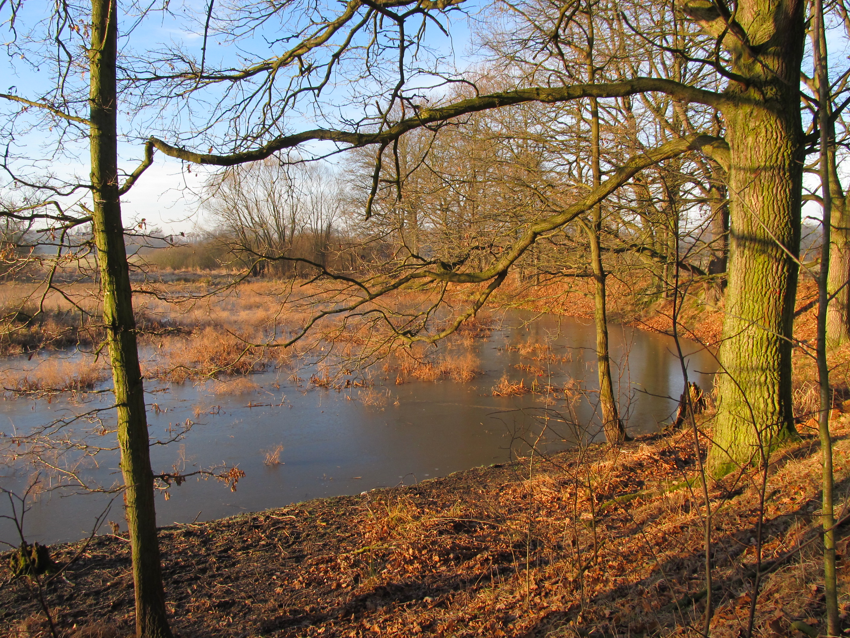 Přírodní rezervace Luňáky